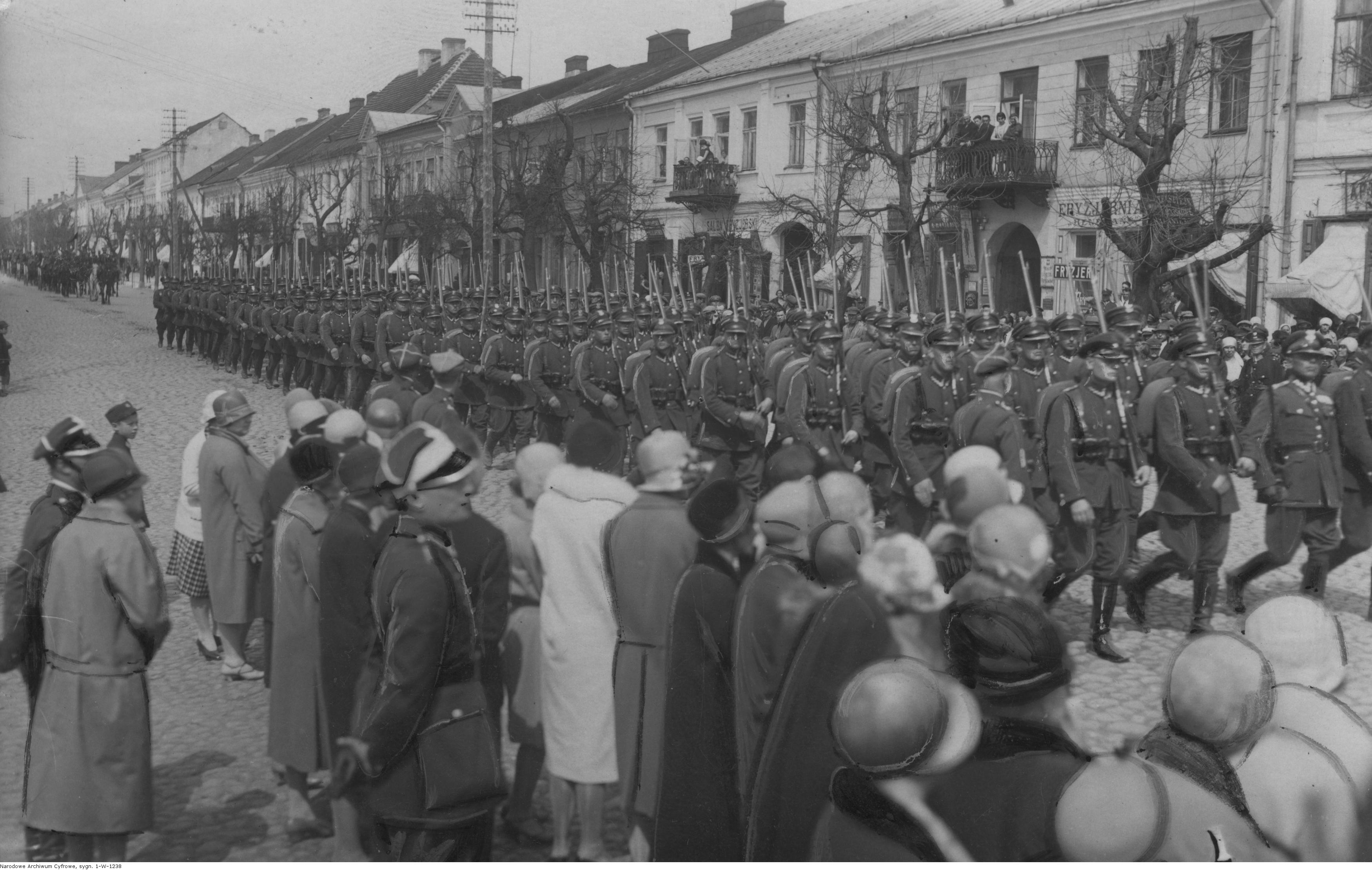 Święto 41 Suwalskiego Pułku Piechoty Józefa Piłsudskiego w Suwałkach - defilada pułku na ulicach miasta; 8 maja 1928. Koncern Ilustrowany Kurier Codzienny - Archiwum Ilustracji. Sygnatura: 1-W-1238